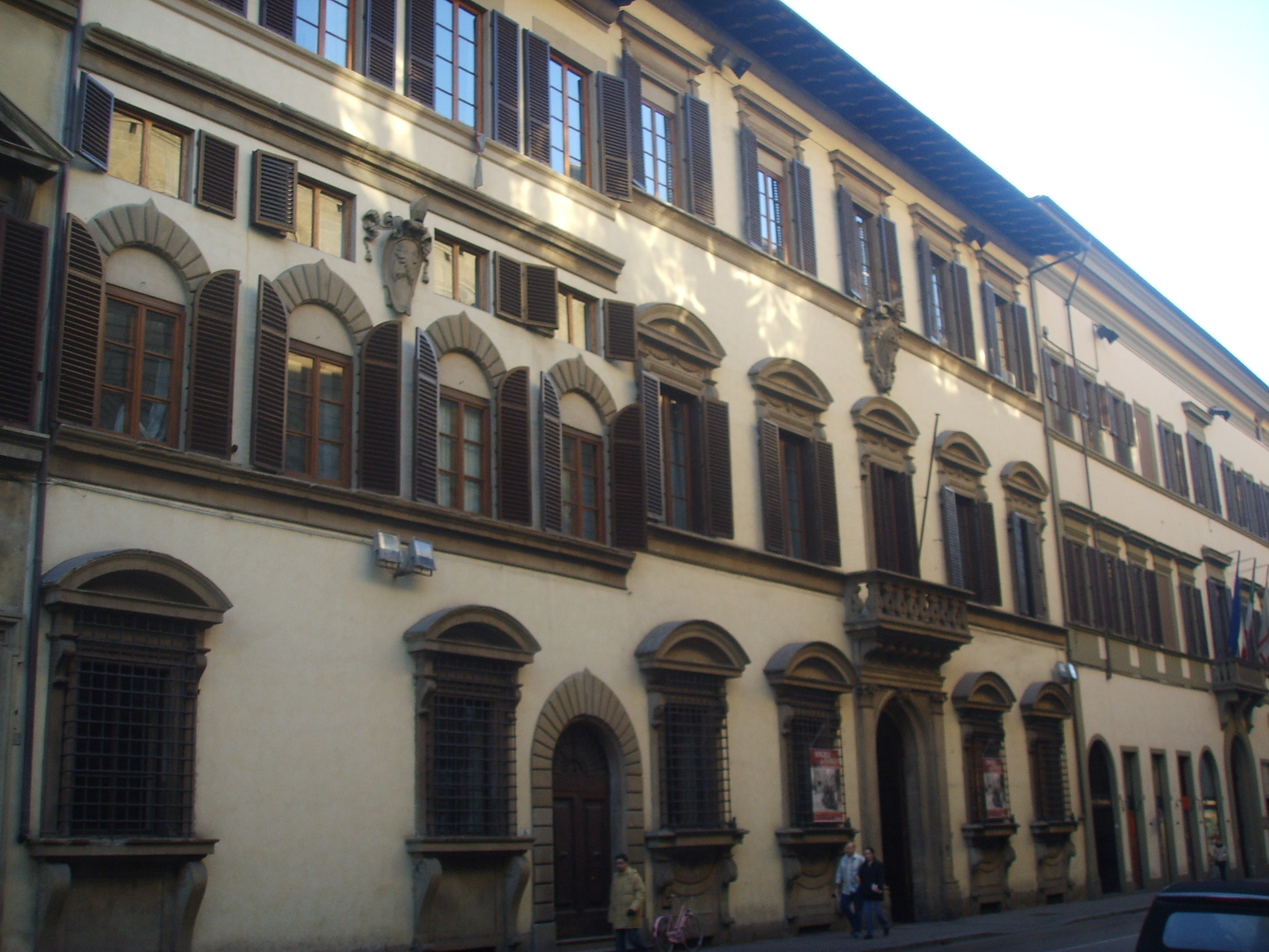 This is Palazzo Capponi Covoni, (next to palazzo panciatichi) in the same street, via cavour, florence italy